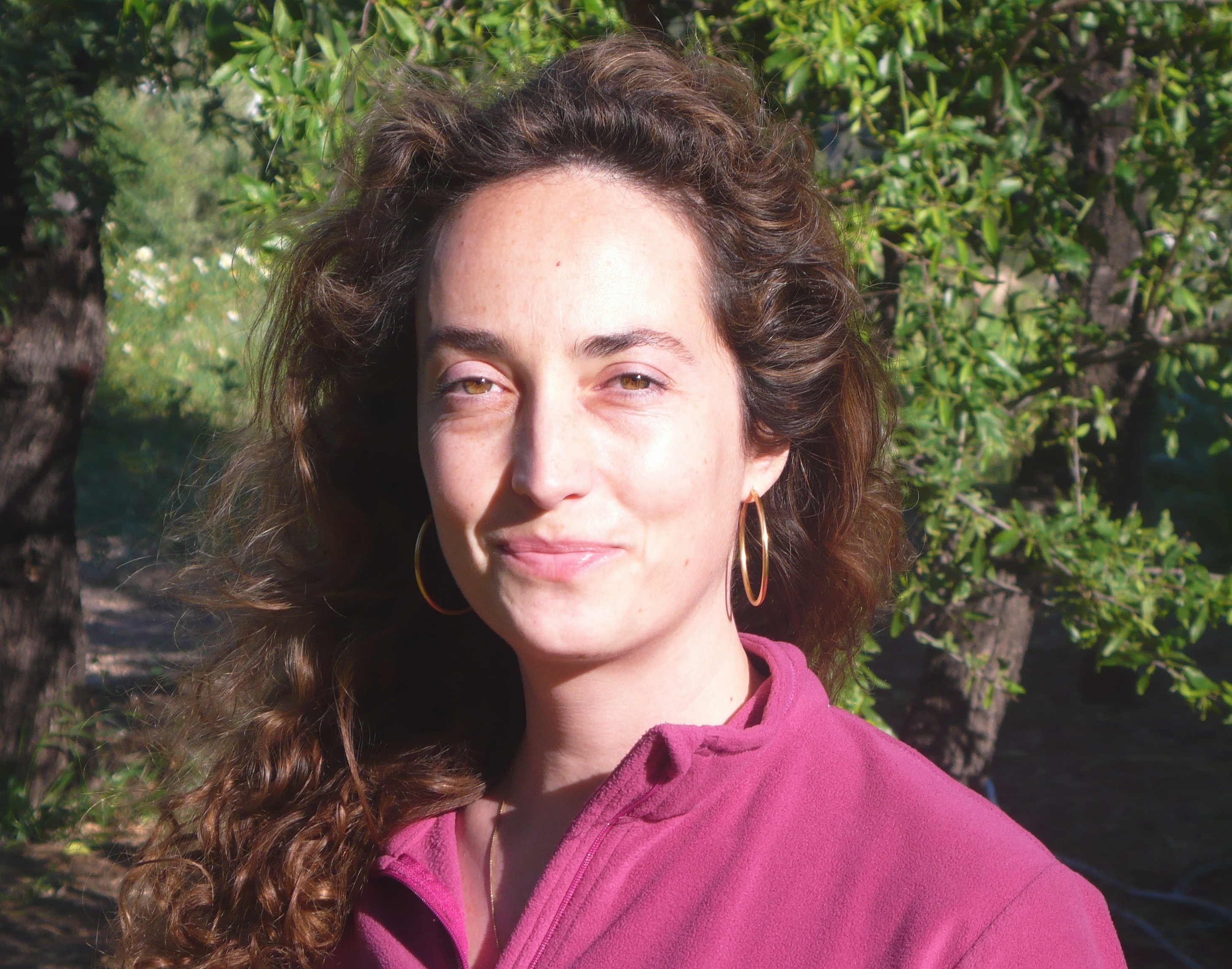 Foto Carolina Punset Campo Altea